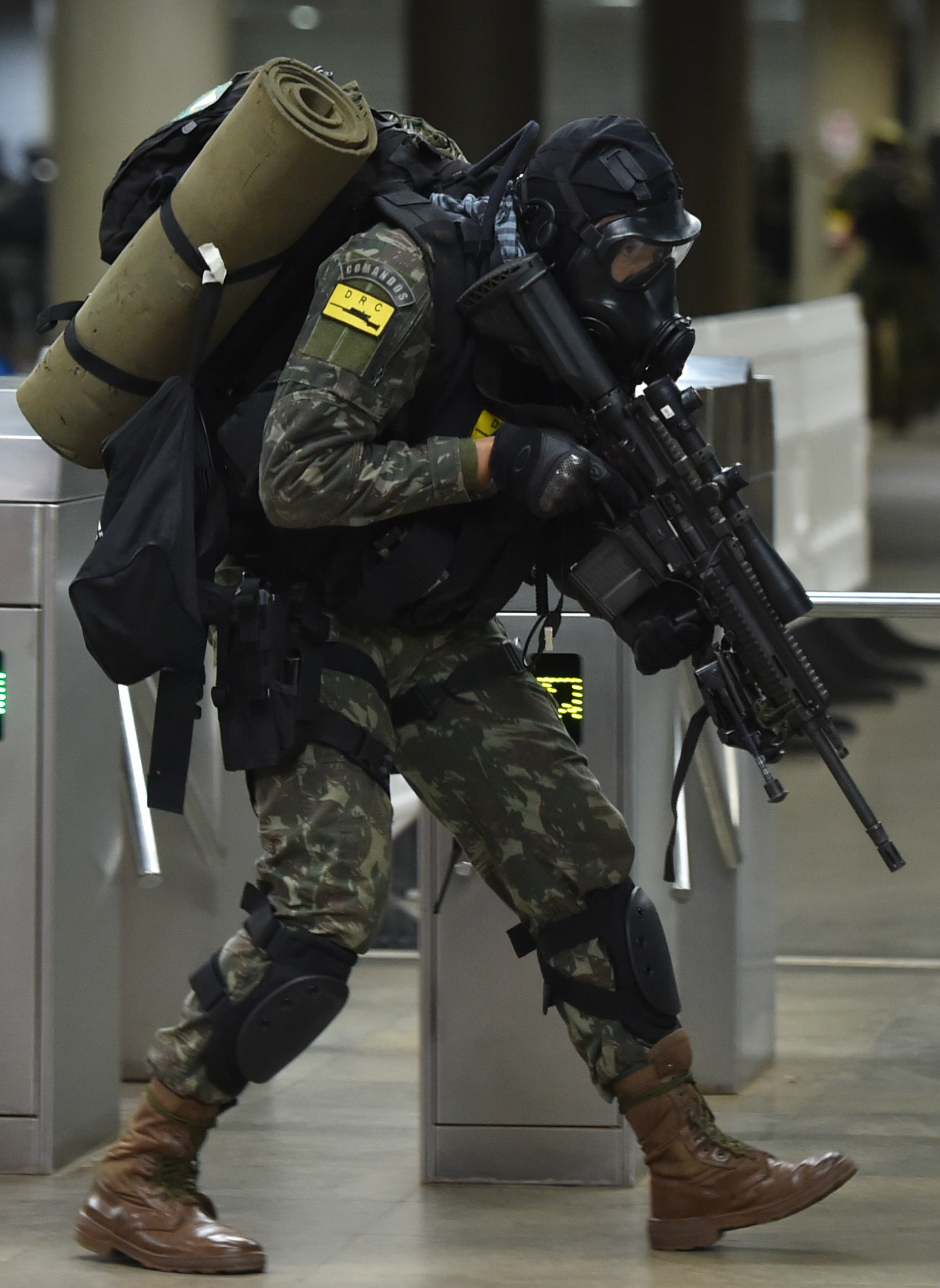 Estação Central do Metrô, Rodoviária do Plano Piloto, Brasília, DF, Brasil 29/7/2016 Foto: Andre Borges/Agência Brasília. O Comando Militar do Planalto executou, nesta quinta-feira (28), uma simulação para agir em caso de atentados durante a Olimpíada 2016 em Brasília. Por volta das 23 horas de ontem, figurantes que se passaram por terroristas anunciaram que estavam armados e que tinham reféns. Os agentes de segurança do metrô informam o Centro Integrado de Comando e Controle Regional, responsável por acionar os batalhões responsáveis,que tomaram a estação.